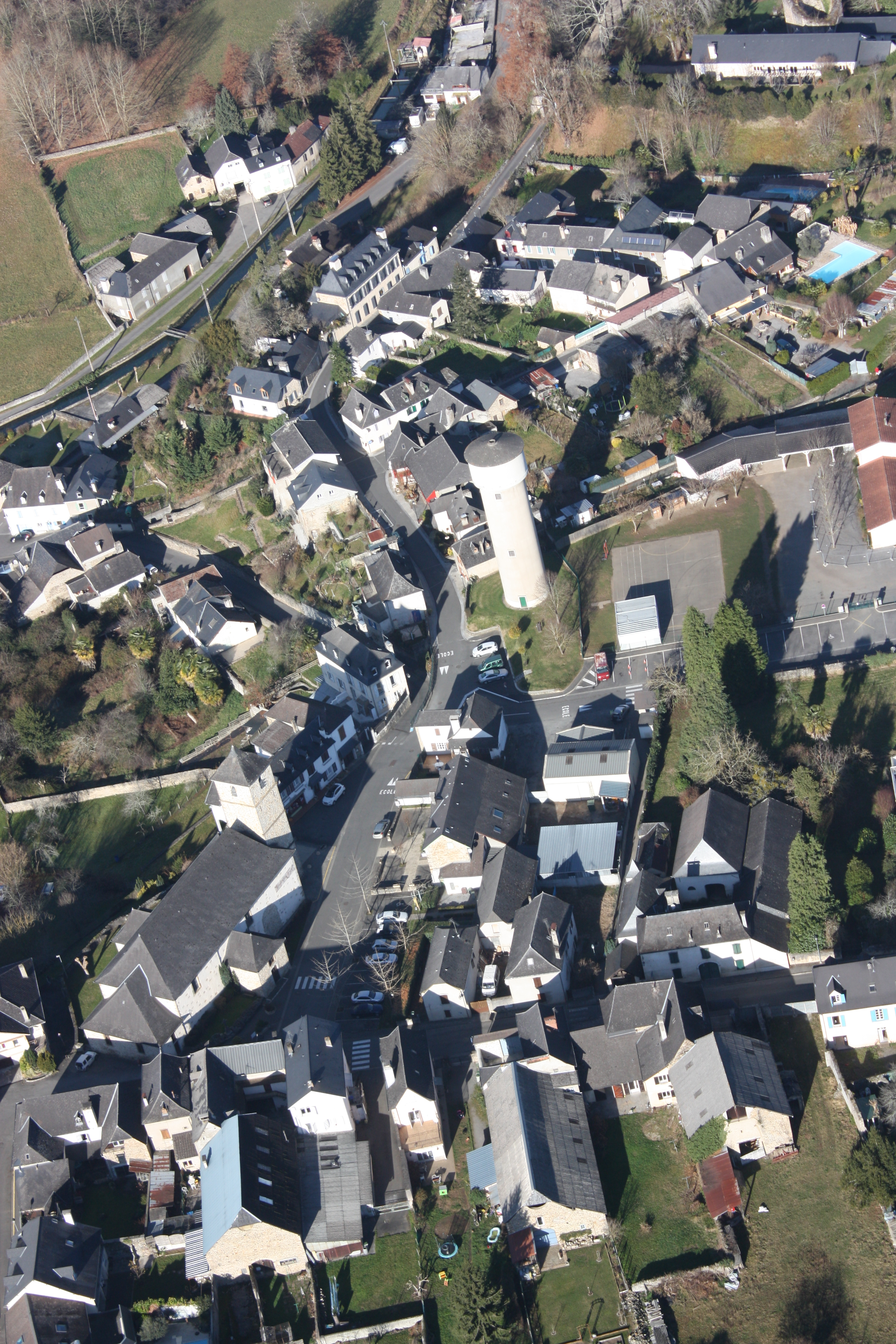 MOUMOUR, FRANCIA, pueblo desde el cielo...